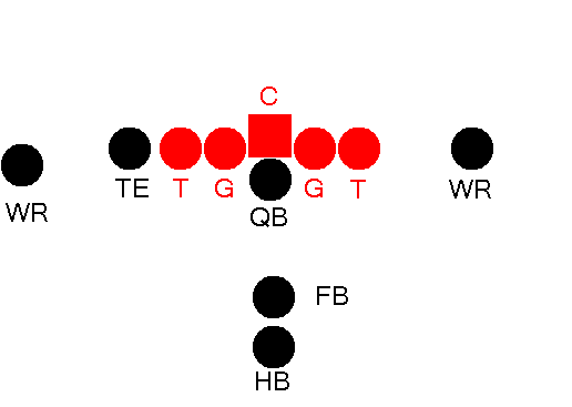 selbst gezeichnetes Bild; erstellt am 3.9.2006